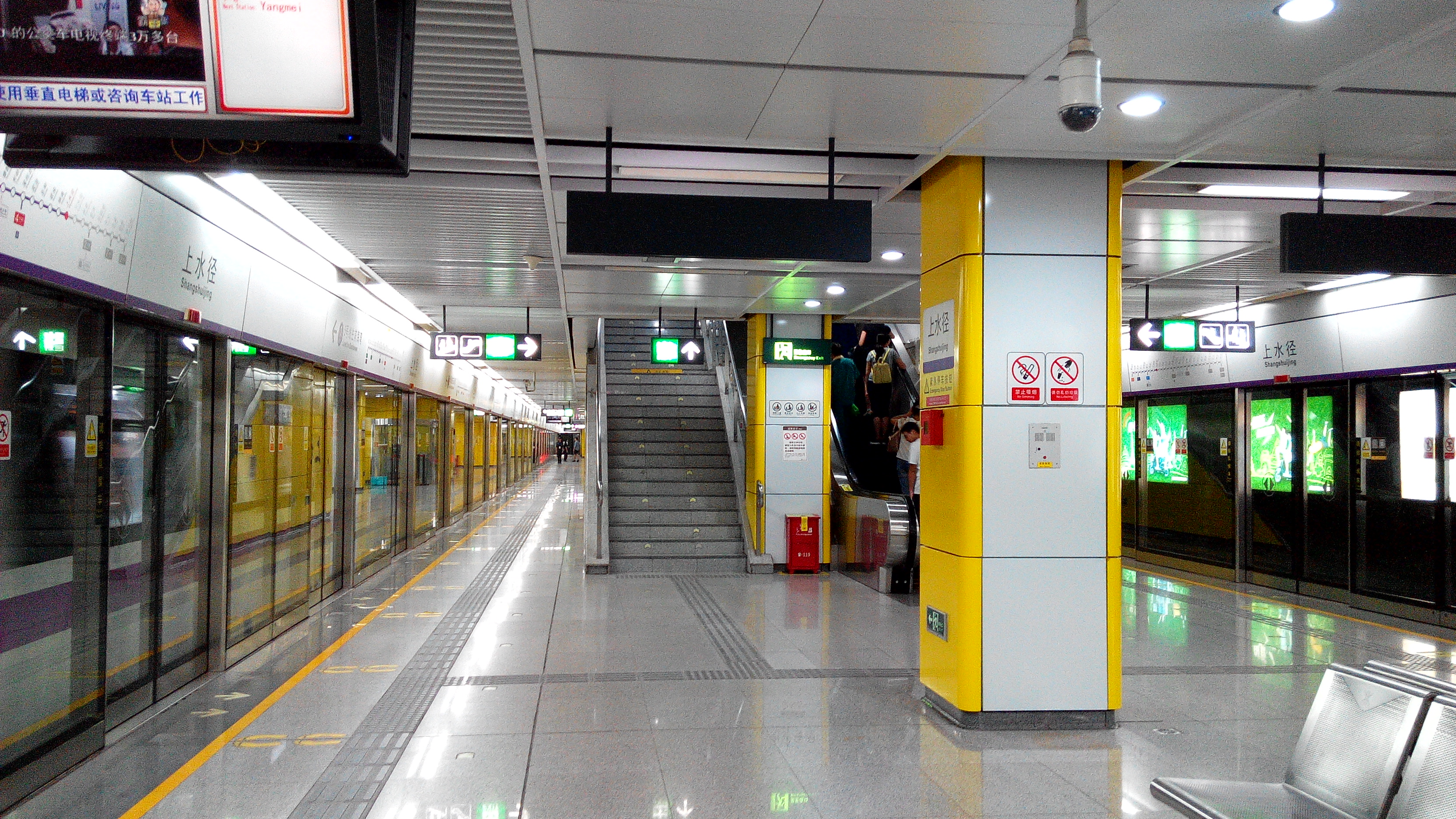 深圳地铁5号线上水径站站台